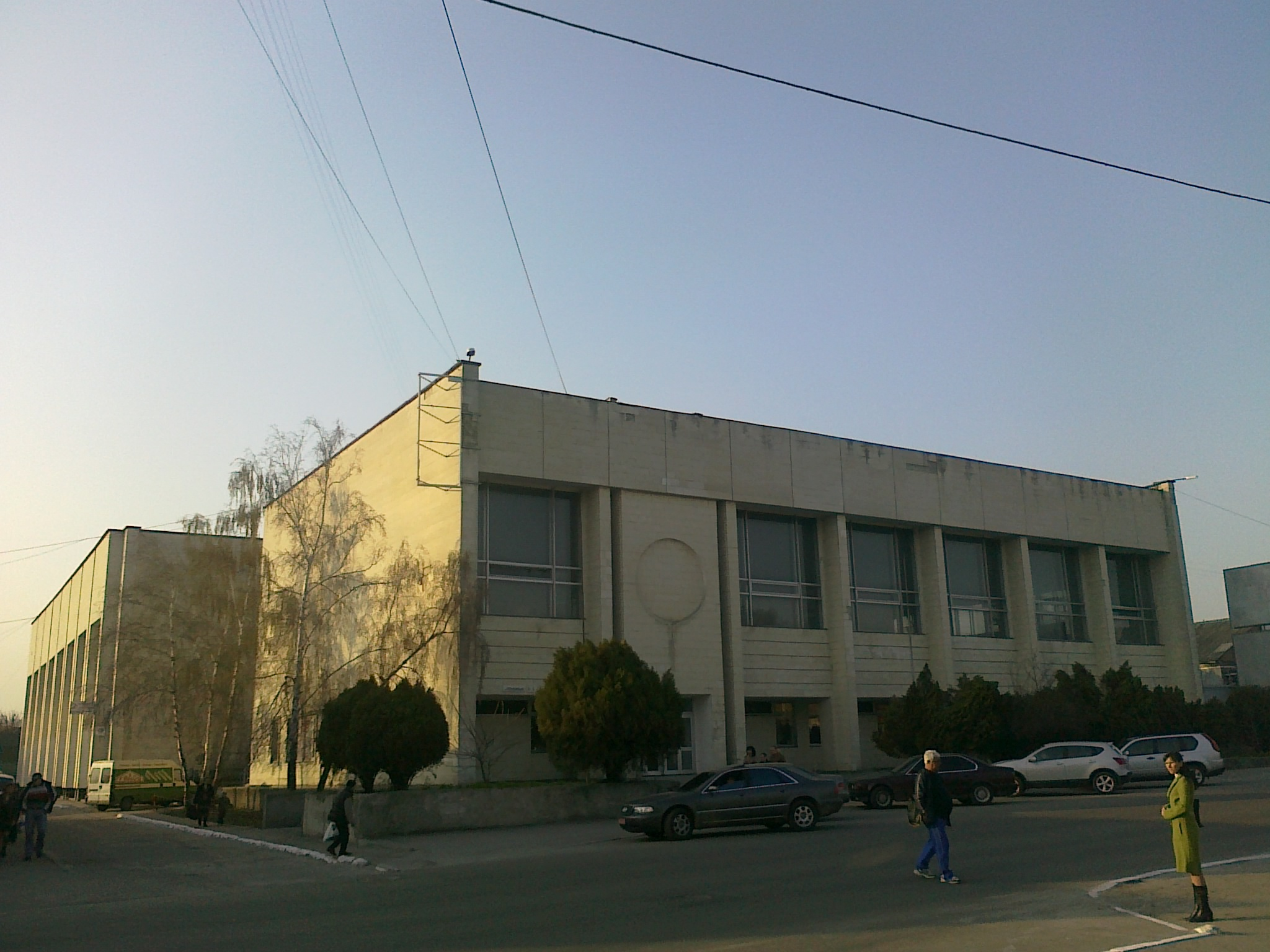 Дитячо-юнацька спортивна школа №1 (Біла Церква, вул. Героїв Небесної Сотні, 46)